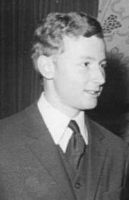 Wolfgang Schwarz, 1966.